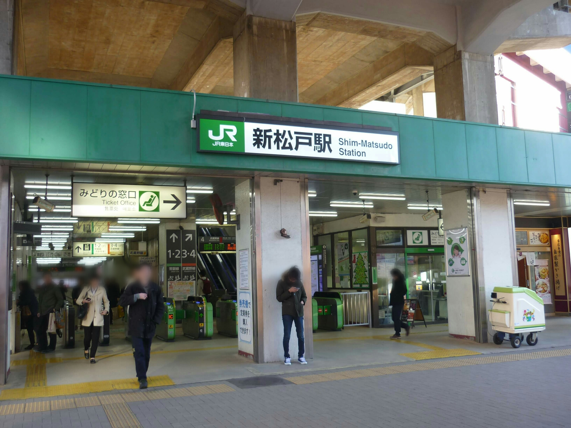 新松戸駅入口